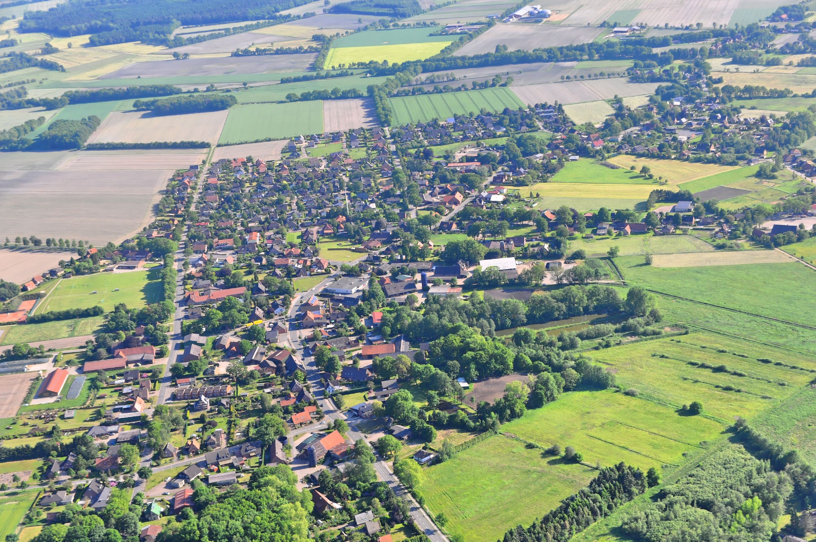 Überführungsflug vom Flugplatz Nordholz-Spieka über Lüneburg, Potsdam zum Flugplatz Schwarzheide-Schipkau